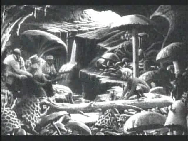 Méliès, viaggio nella luna (1902) 09